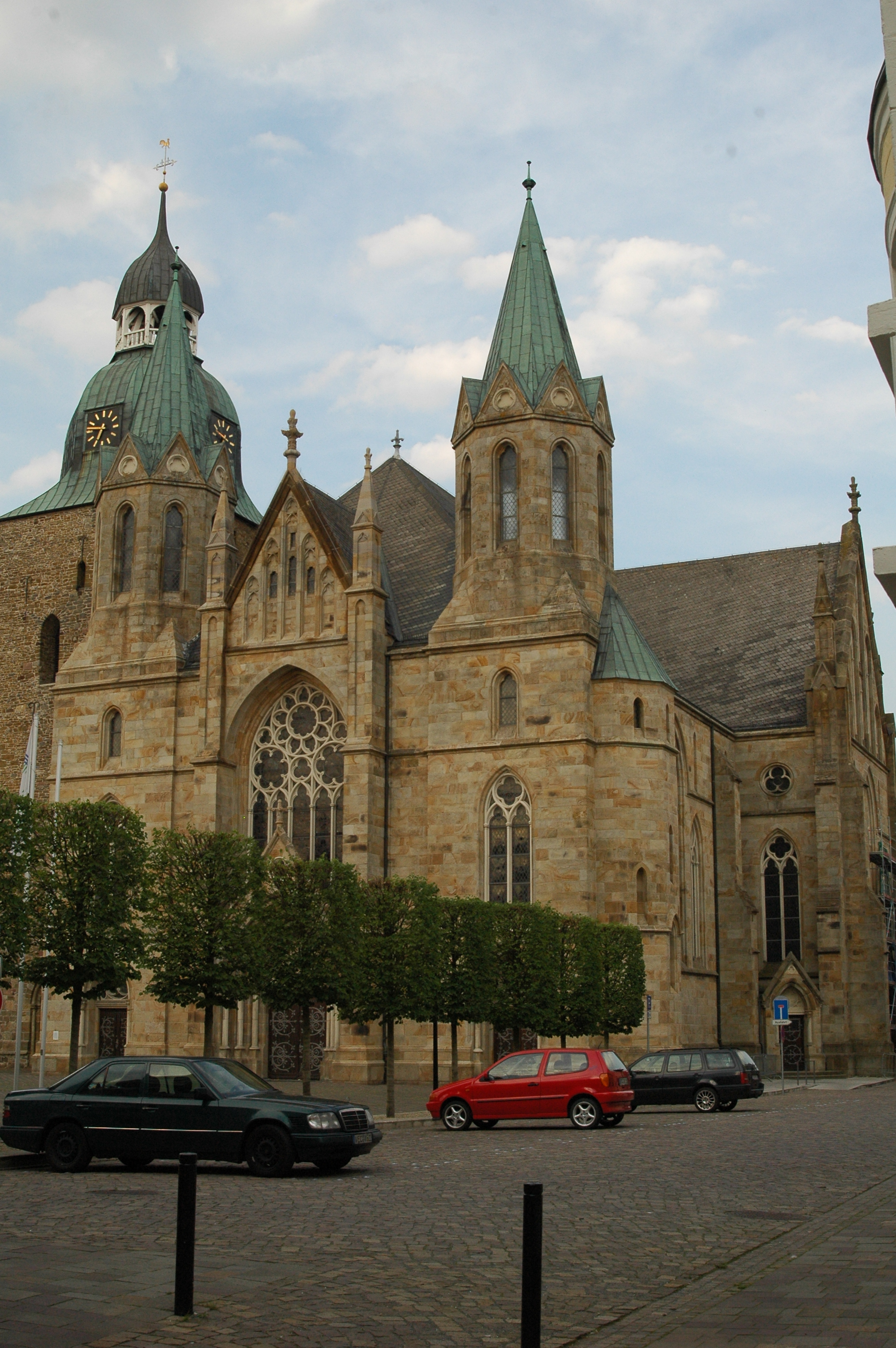 Damme, Kirche